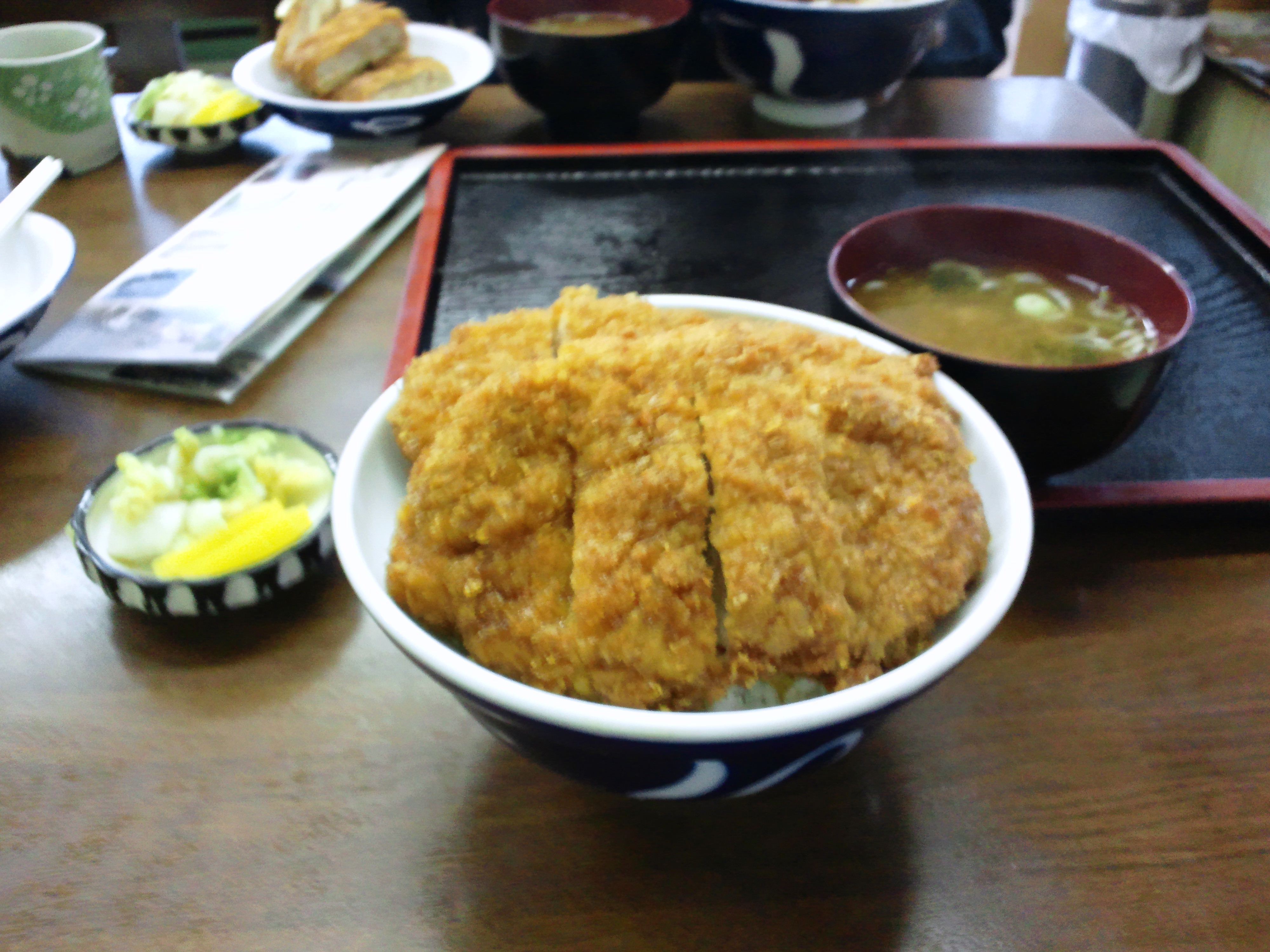 下仁田カツ丼 きよしや